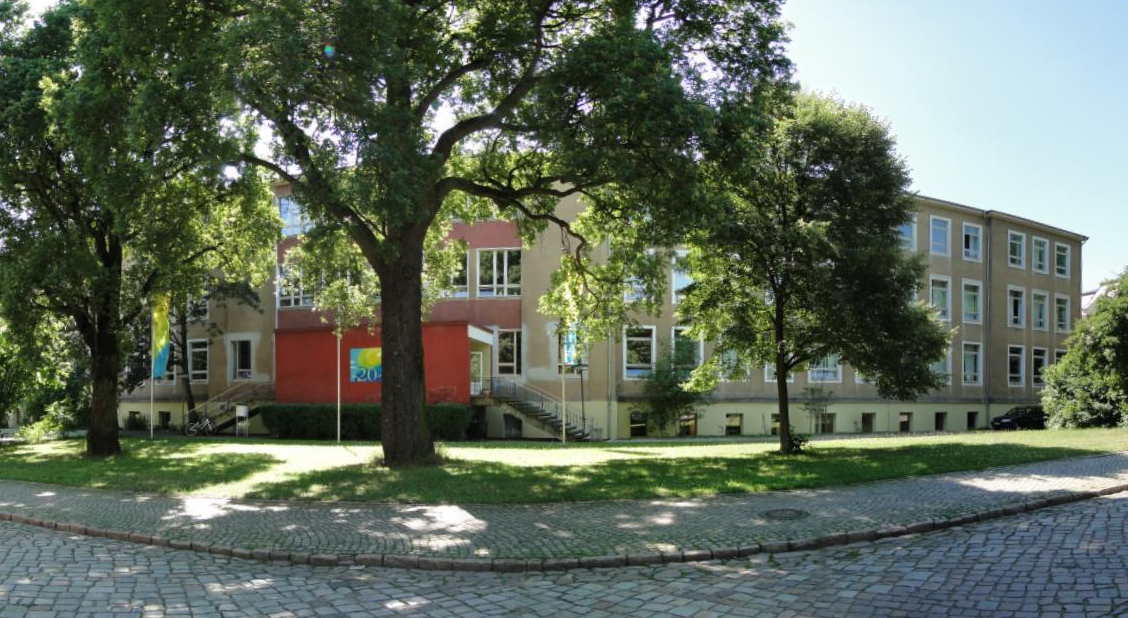 Freie Waldorfschule Dresden, früher Freiherrlich von Fletchersches Lehrerseminar; aus Einzelfotos zusammengesetzt mit Autostitch